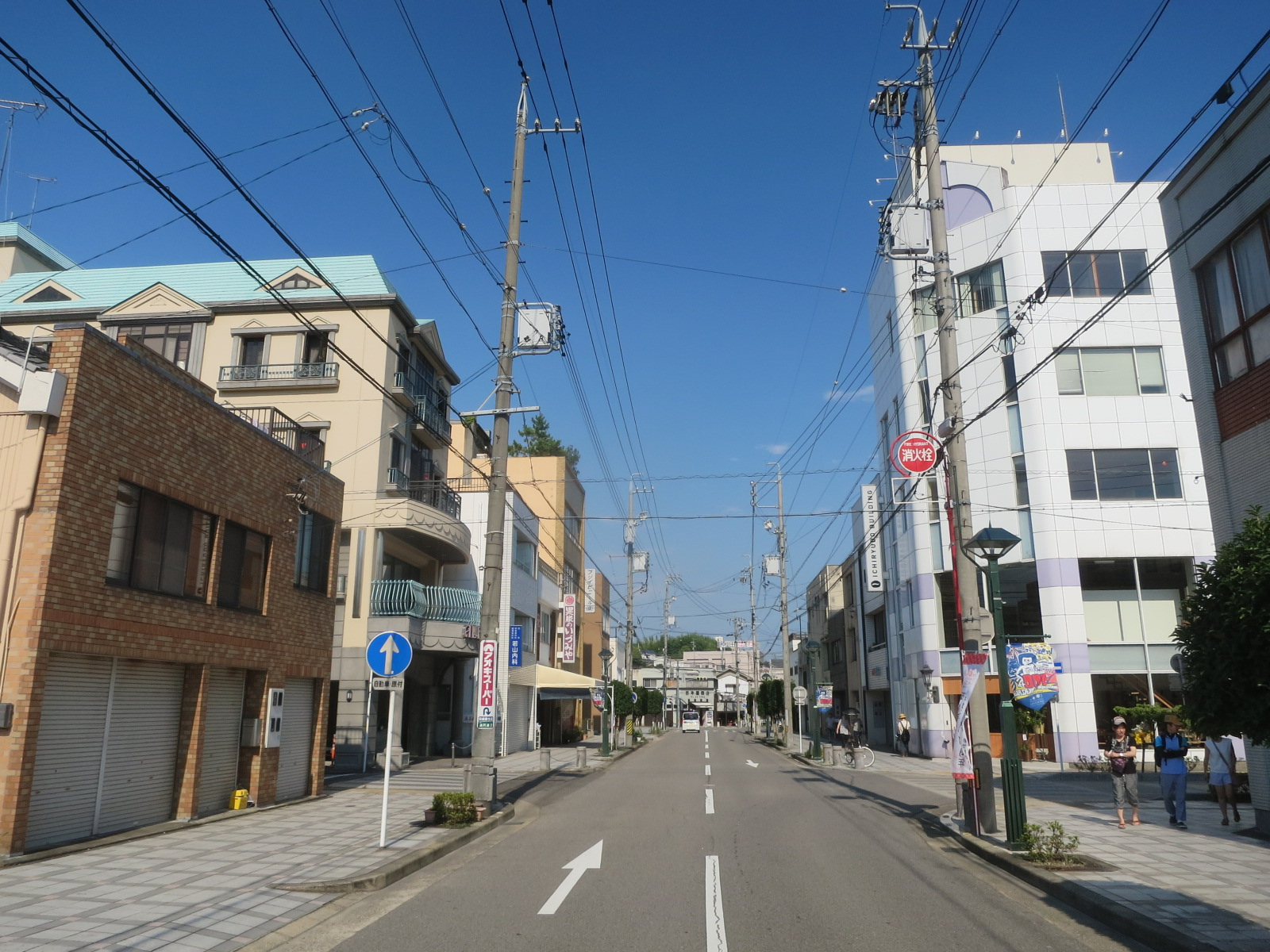 連尺通り（岡崎市）